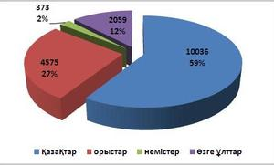 Оқырмандардың ұлттық құрамы (Л.Н.Толстой атындағы Қостанай облыстық әмбебап ғылыми кітапхана)